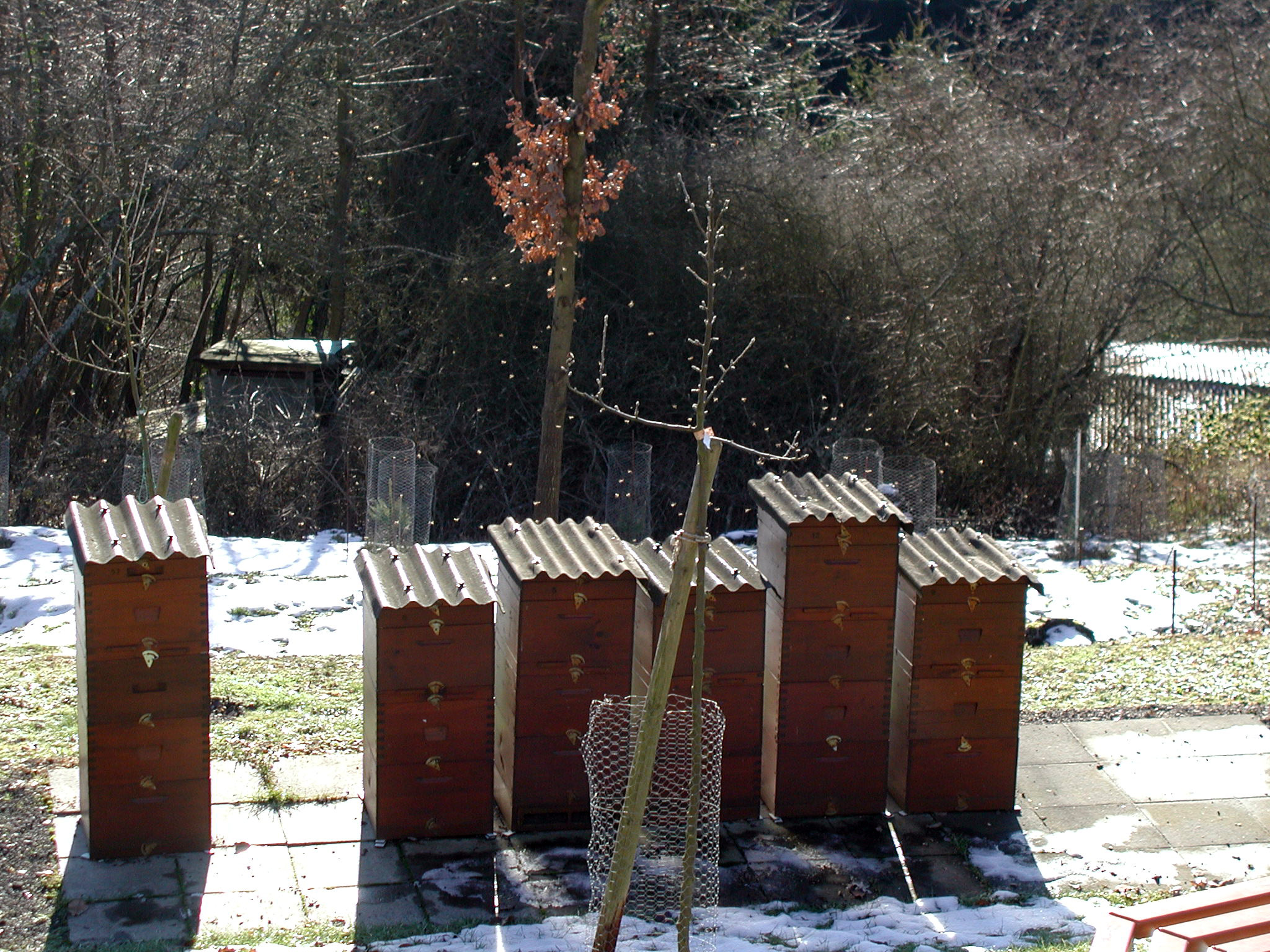 Apis-mellifera-Bienen